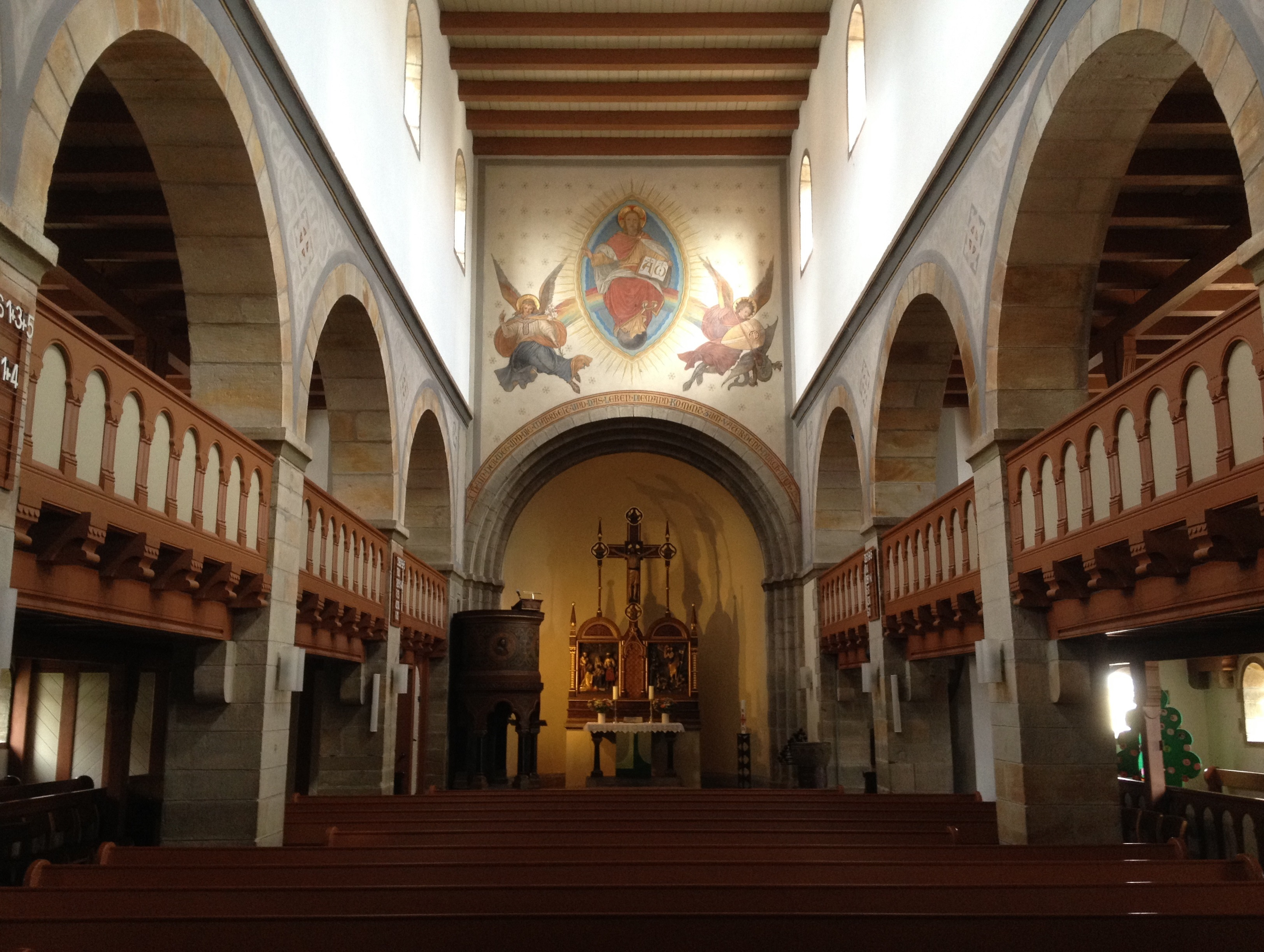 Bad Pyrmont, ev.-luth. St.-Petri-Kirche